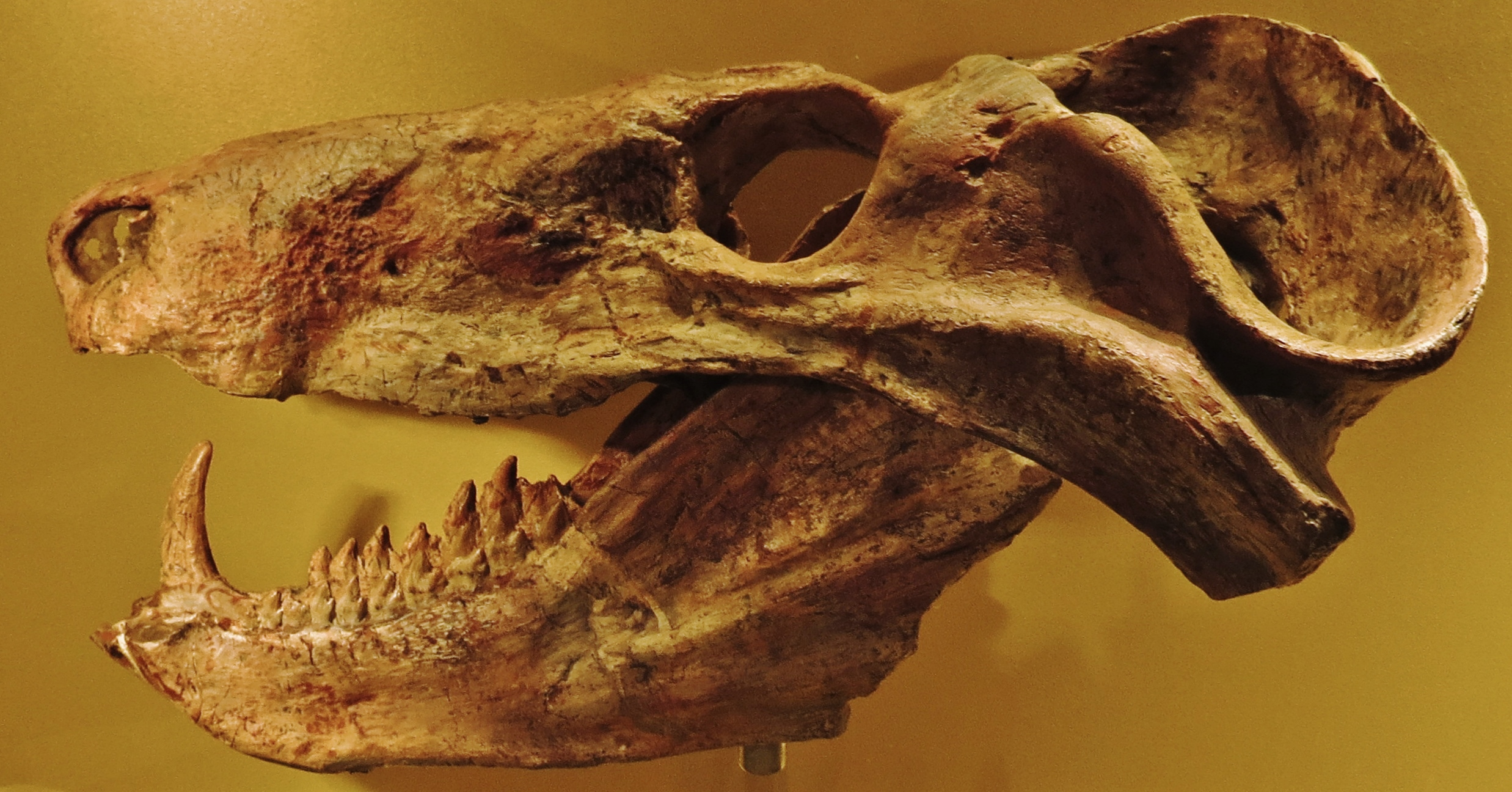 Took the picture at Museum Mensch und Natur, Munchen